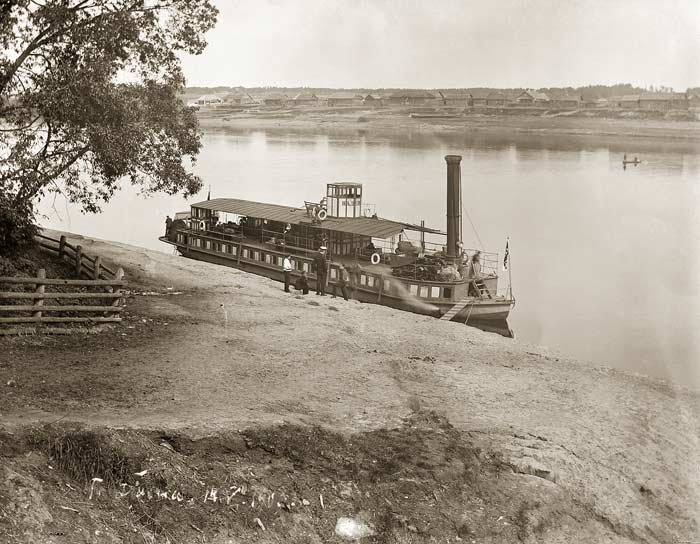 Беларуская (тарашкевіца): Дзісна (Dzisna), рака Дзьвіна (Dźvina). Параход Надзея